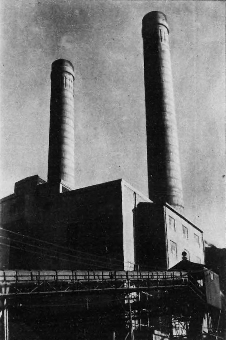 名古屋火力発電所近景